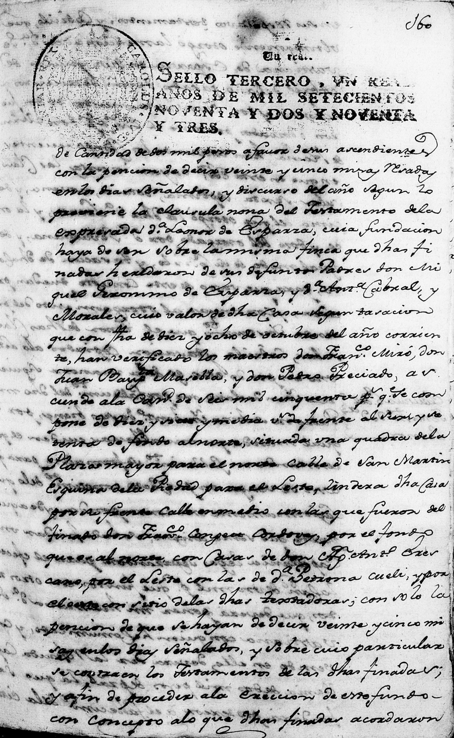 Fundación de capellanía por Juan de Canaveris y María Eugenia Sánchez, albaceas de Leonor y Sebastiana Esparza.